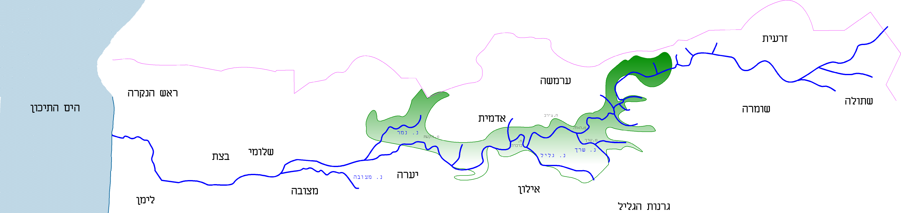 מפה של נחל בצת